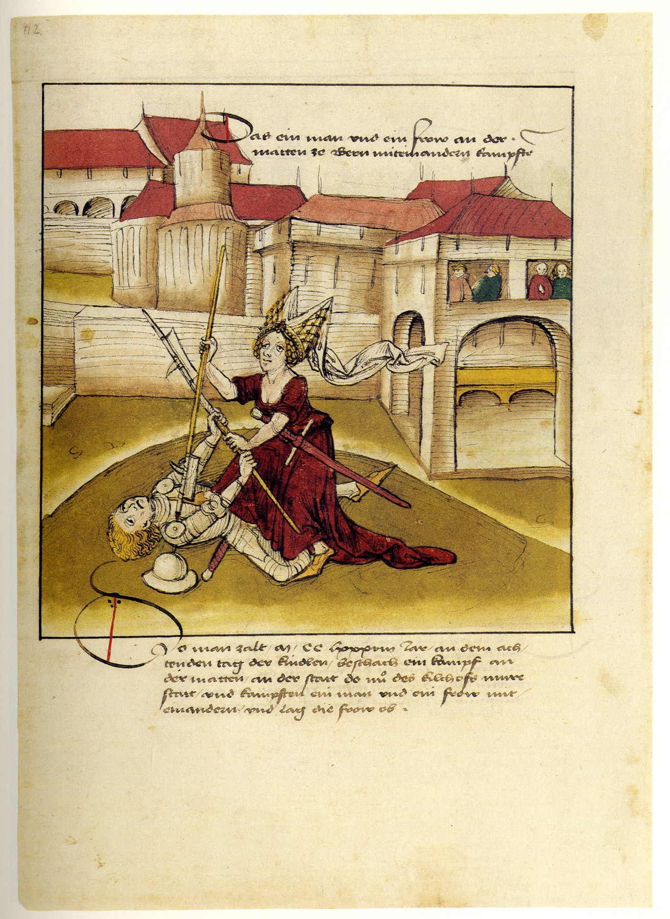 Schilling, Diebold (1991) Haeberli, Hans , ed. (in German) Die Schweiz im Mittelalter in Diebold Schillings Spiezer Chronik, Lucerne: Faksimile Verlag OCLC: 1006271086. Handschrift Mss. hist. helv. I. 16; Bürgerbibliothek Bern